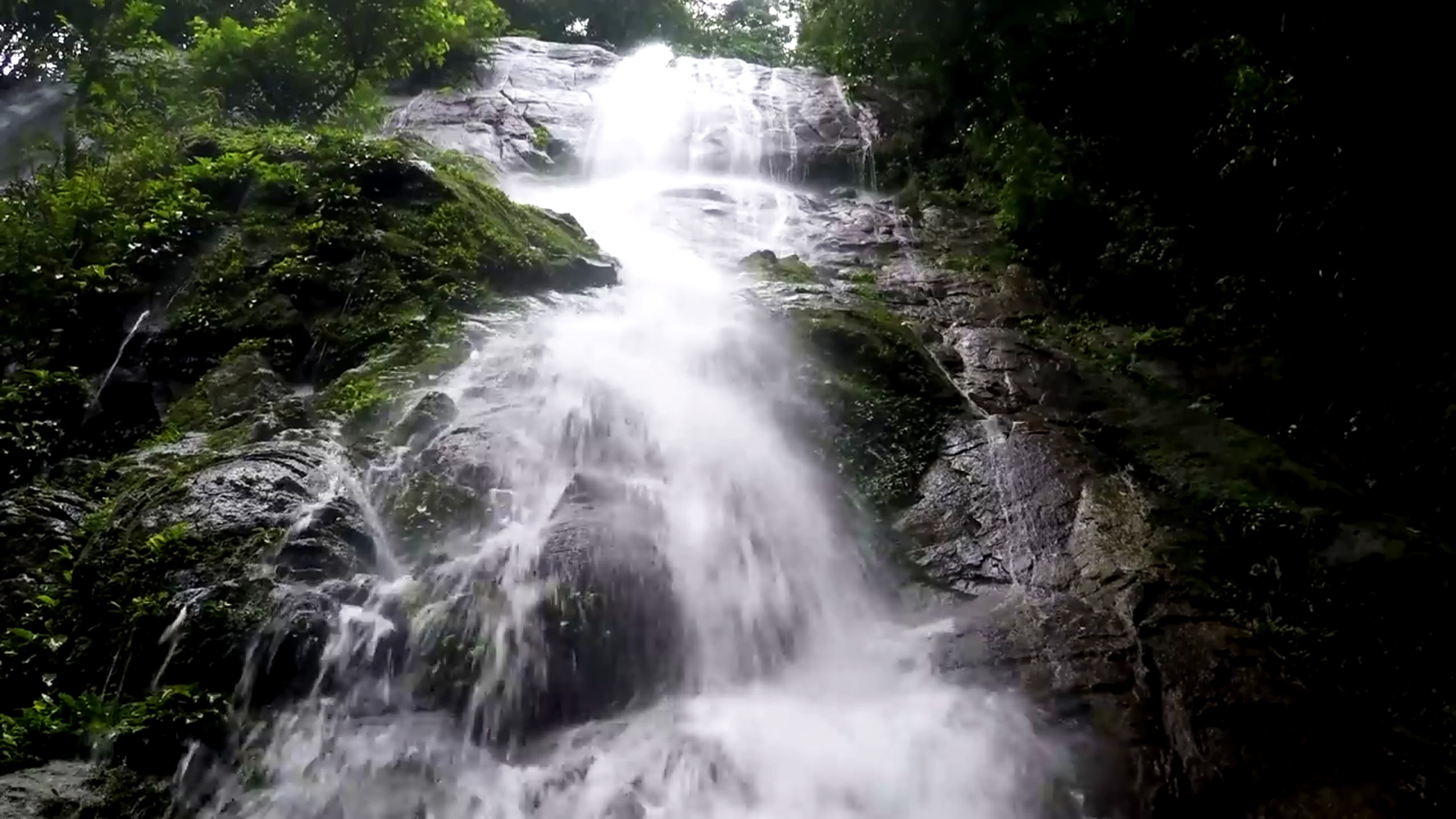 Le parc national de Korup est situé au Sud-Ouest du pays, à la frontière avec le Nigeria.